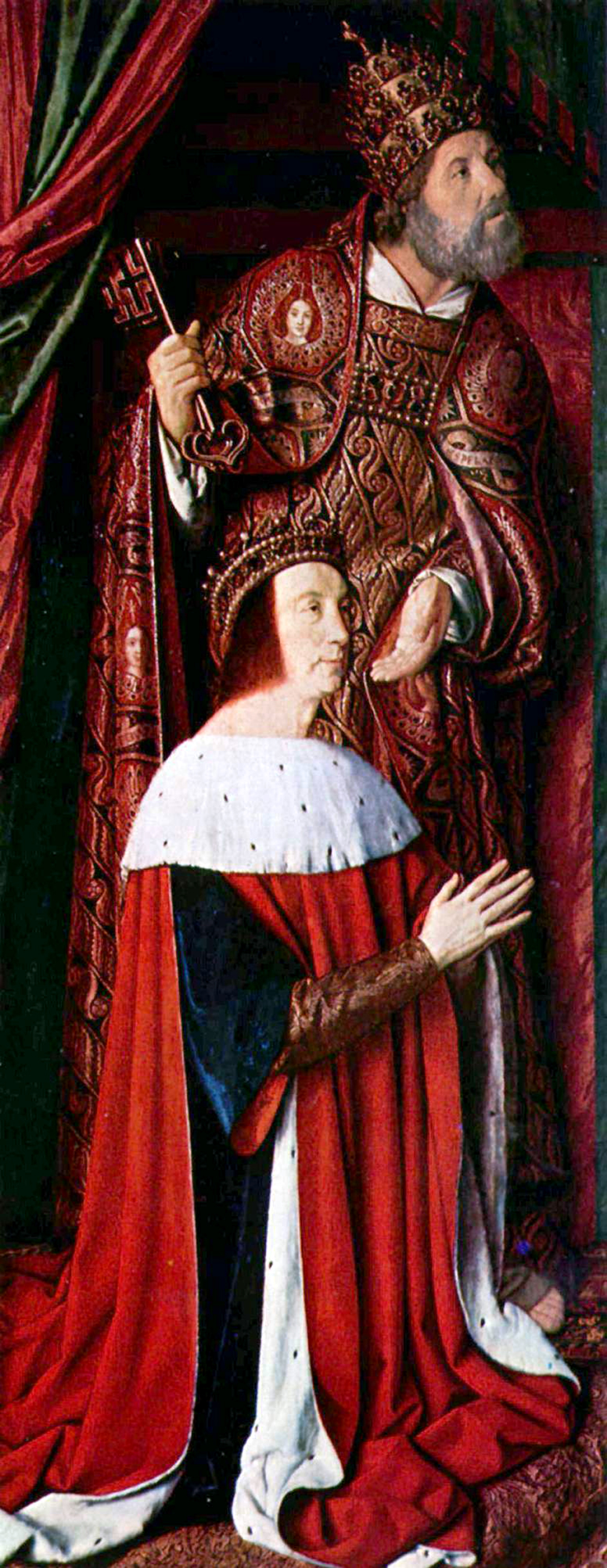 Linker Flügel: Porträt des Pierre de Bourbon mit dem Hl. Petrus